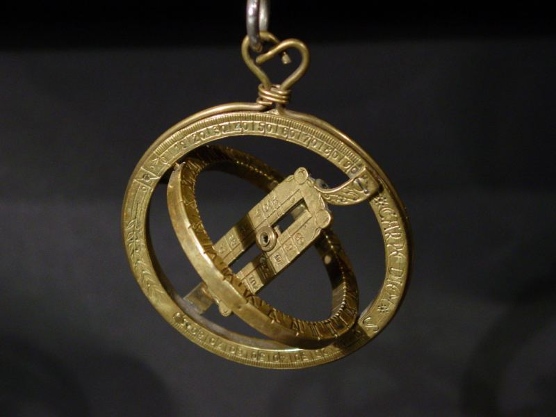 Photo einer tragbaren Sonnenuhr mit Lochgnomon und nach Monaten / Zodiakzeichen korrigierbarer Gnomonposition.